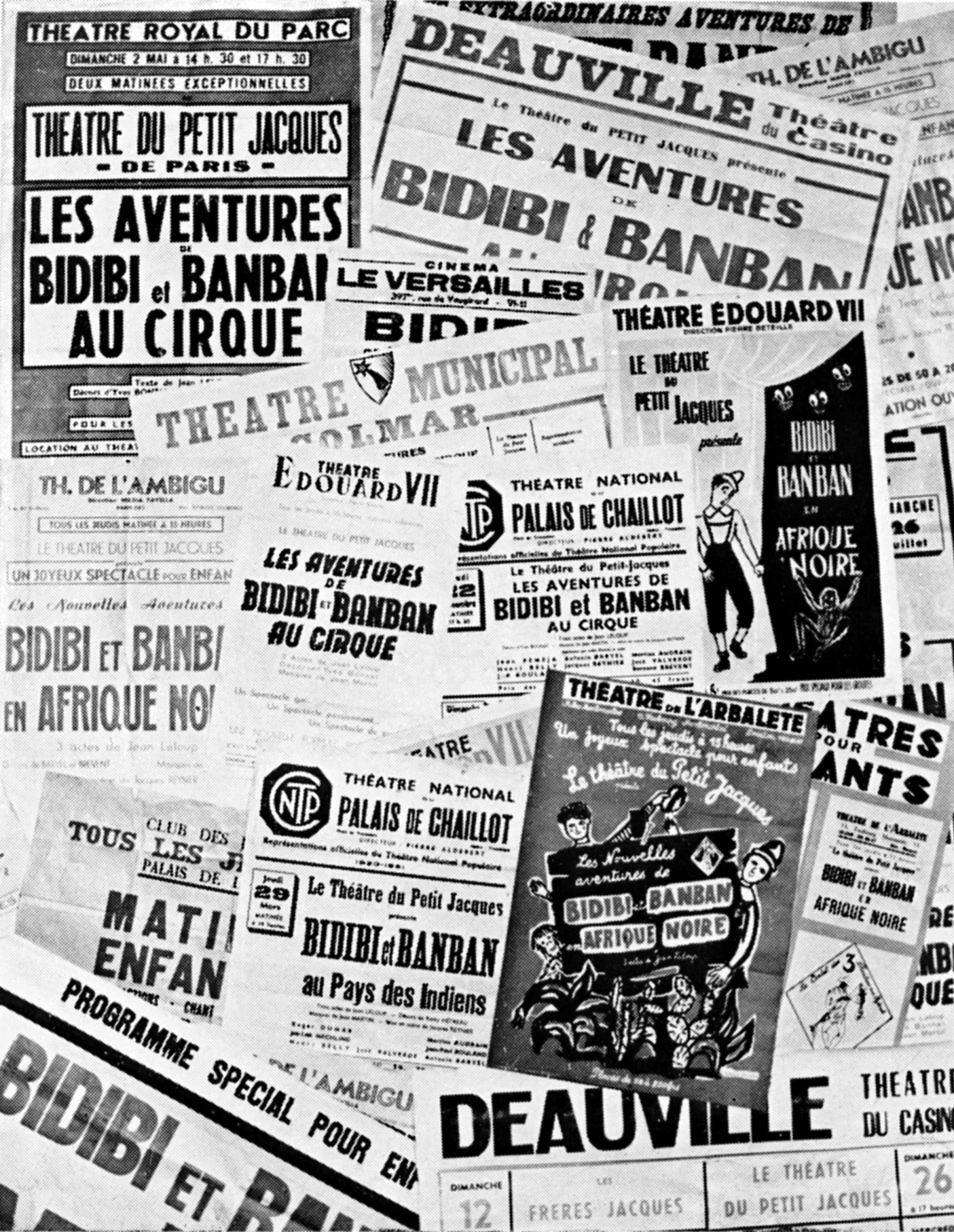 Diverses affiches des années 1950 réalisées pour les représentations théâtrales "Les aventures de Bidibi et Banban".